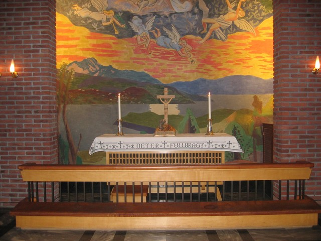 Alteret i Fredskapellet i Narvik i Narvik